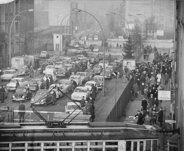 Zentralbild Brüggmann FSo-Krz 5.1.1964 Sonntag 5.1.1964 234 000 Westberliner Besucher in der Hauptstadt der DDR bis 13.00 Uhr Rund 234.000 Westberliner Besucher passierten am 5.1.1964 bis 13.00 Uhr die fünf Übergangsstellen zur Hauptstadt der DDR. Damit erhöhte sich die Gesamtbesucherzahl seit Inkrafttreten des Berlin-Abkommens auf rund 1,2 Millionen. UBz: Starker Fahrzeugverkehr herrschte bereits in den Vormittagsstunden an der Übergangsstelle Chausseestraße. Information added by Wikimedia users.Note: No scanning error, the orignala is in square format.